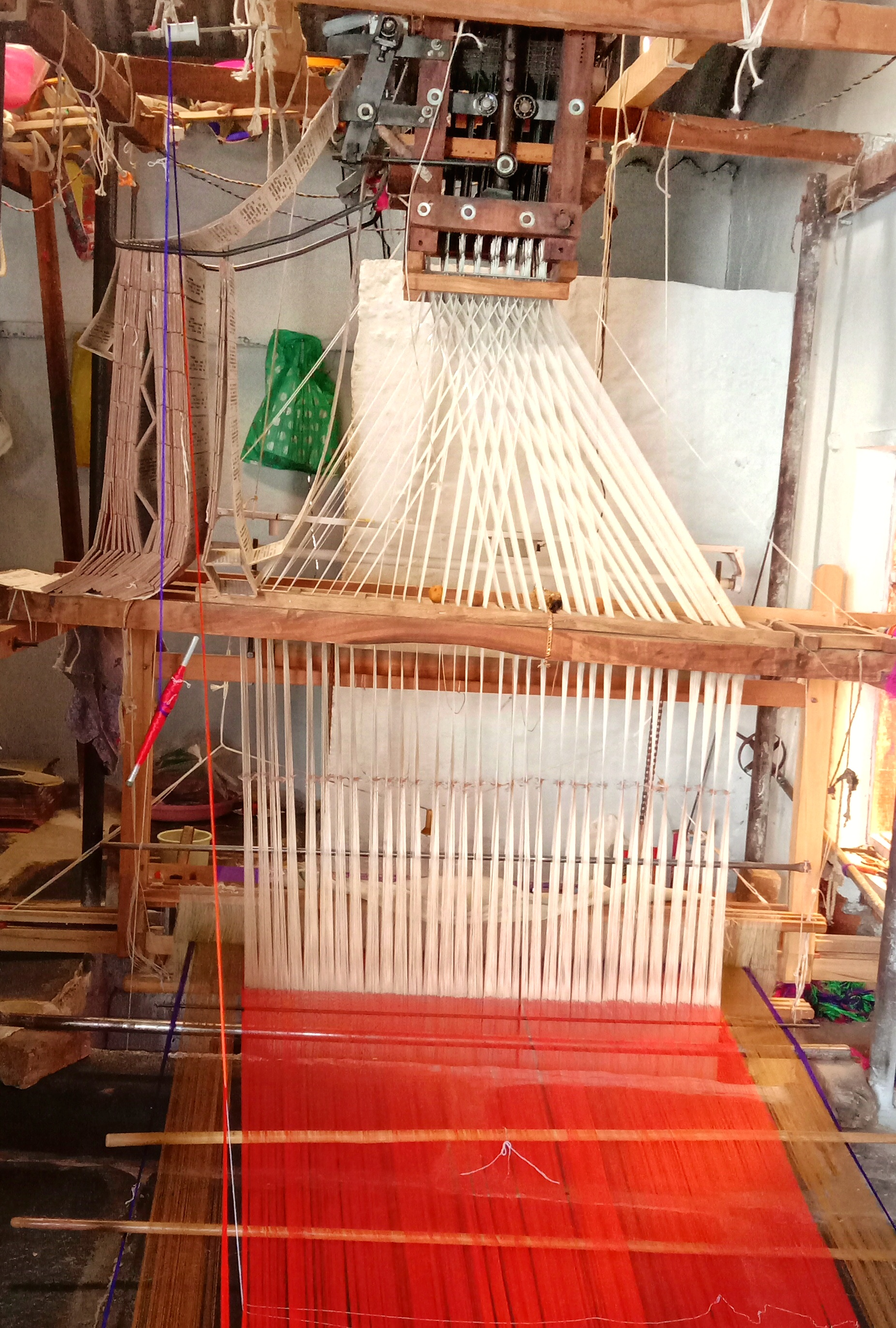 మగ్గం